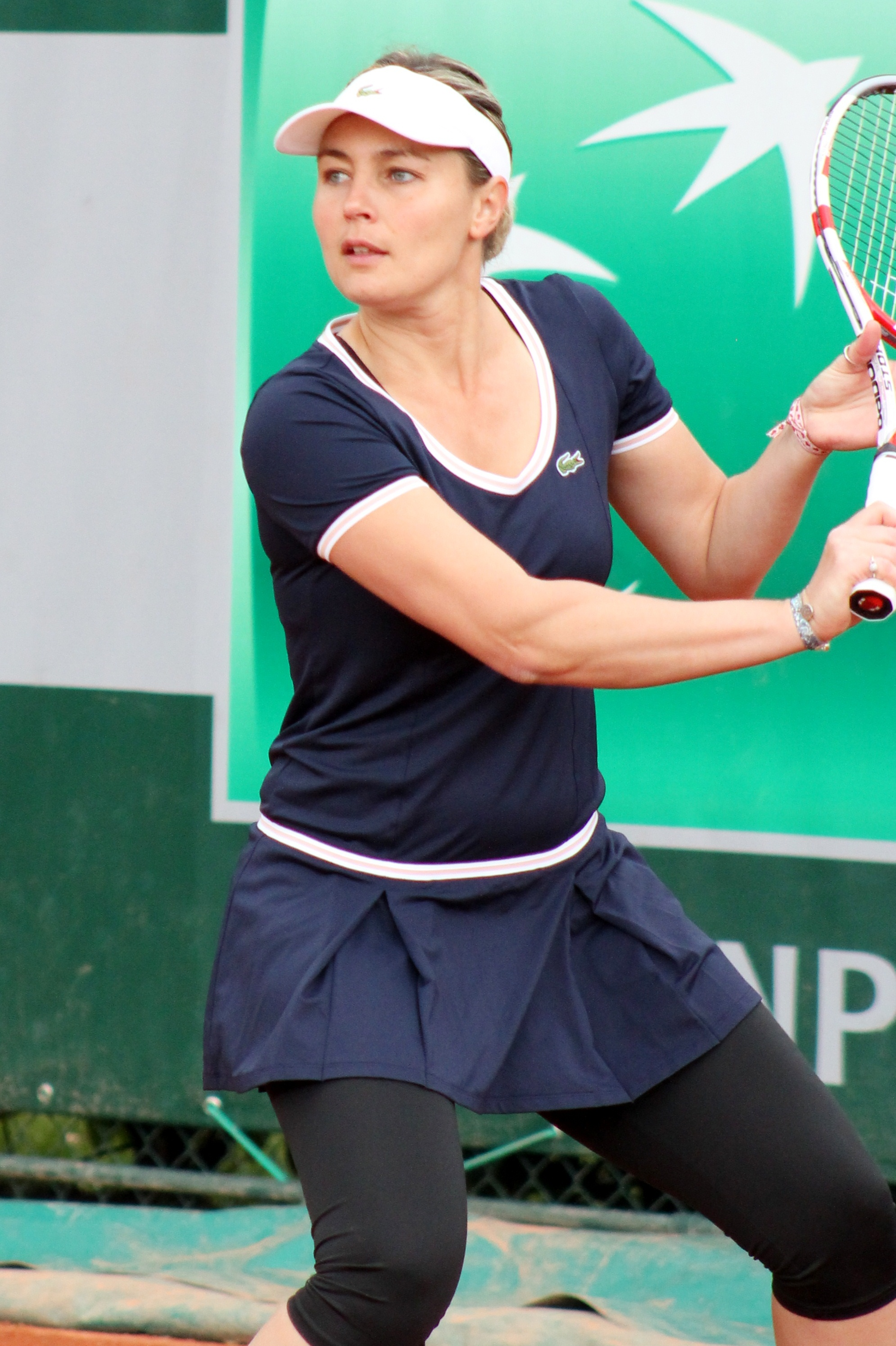 Beltrame RG13 (5)